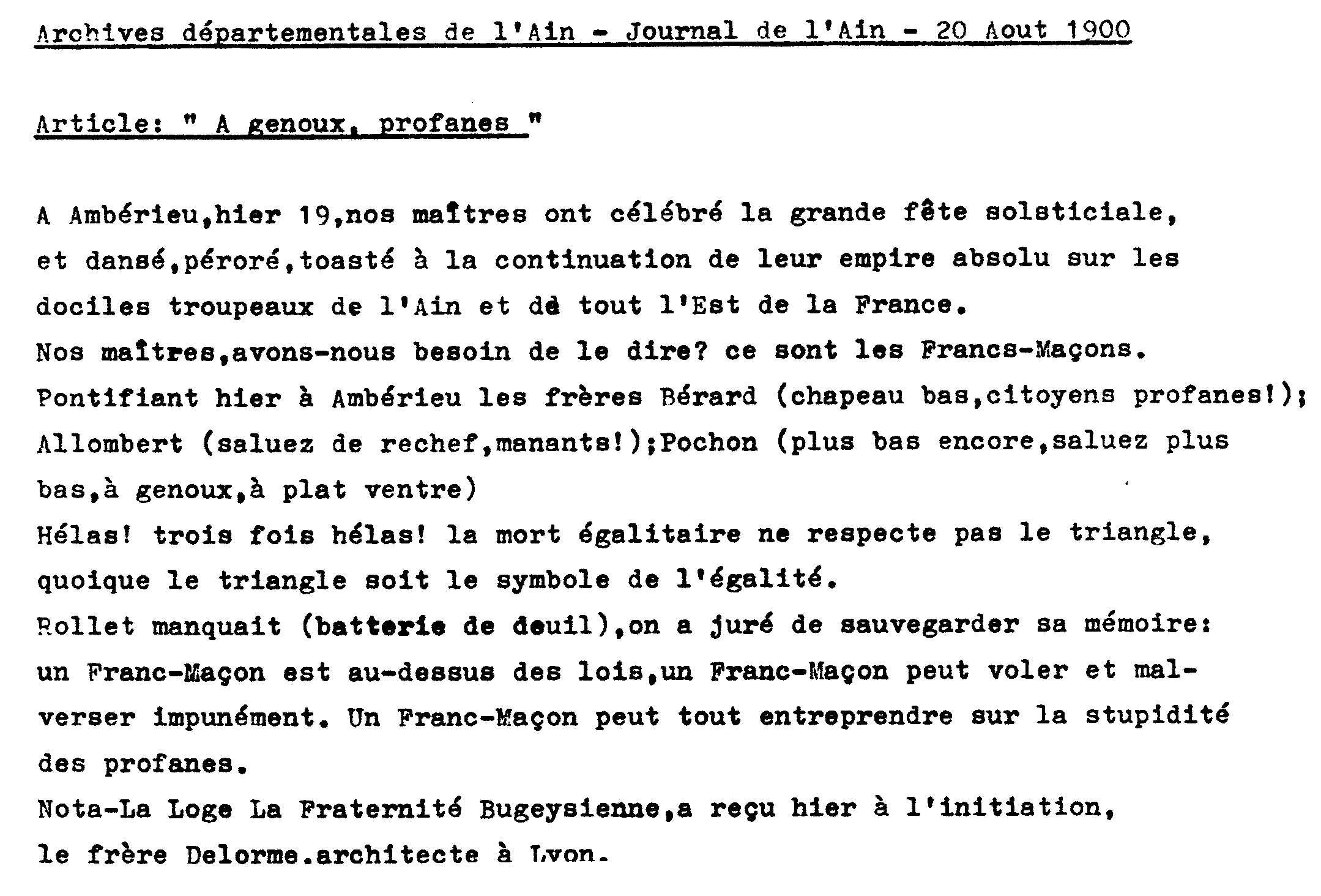 retranscription d'un article du "journal de l'Ain" du 20/0/1900